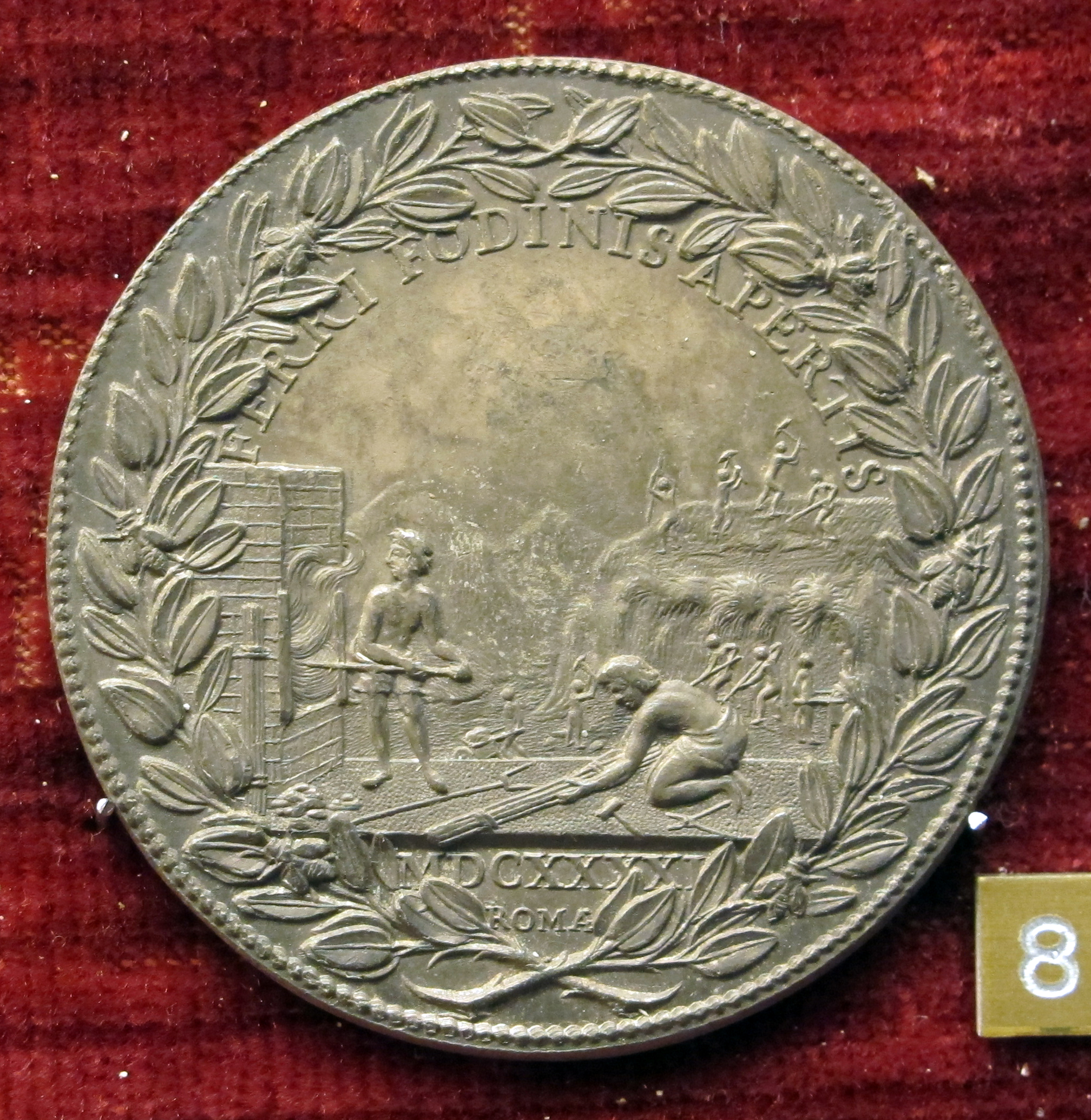 Medaglie romane '600-'700